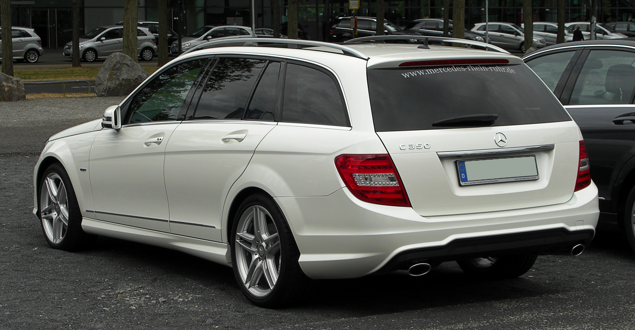 Mercedes-Benz C 350 BlueEFFICIENCY T-Modell Avantgarde Sport-Paket AMG (S 204, Facelift)